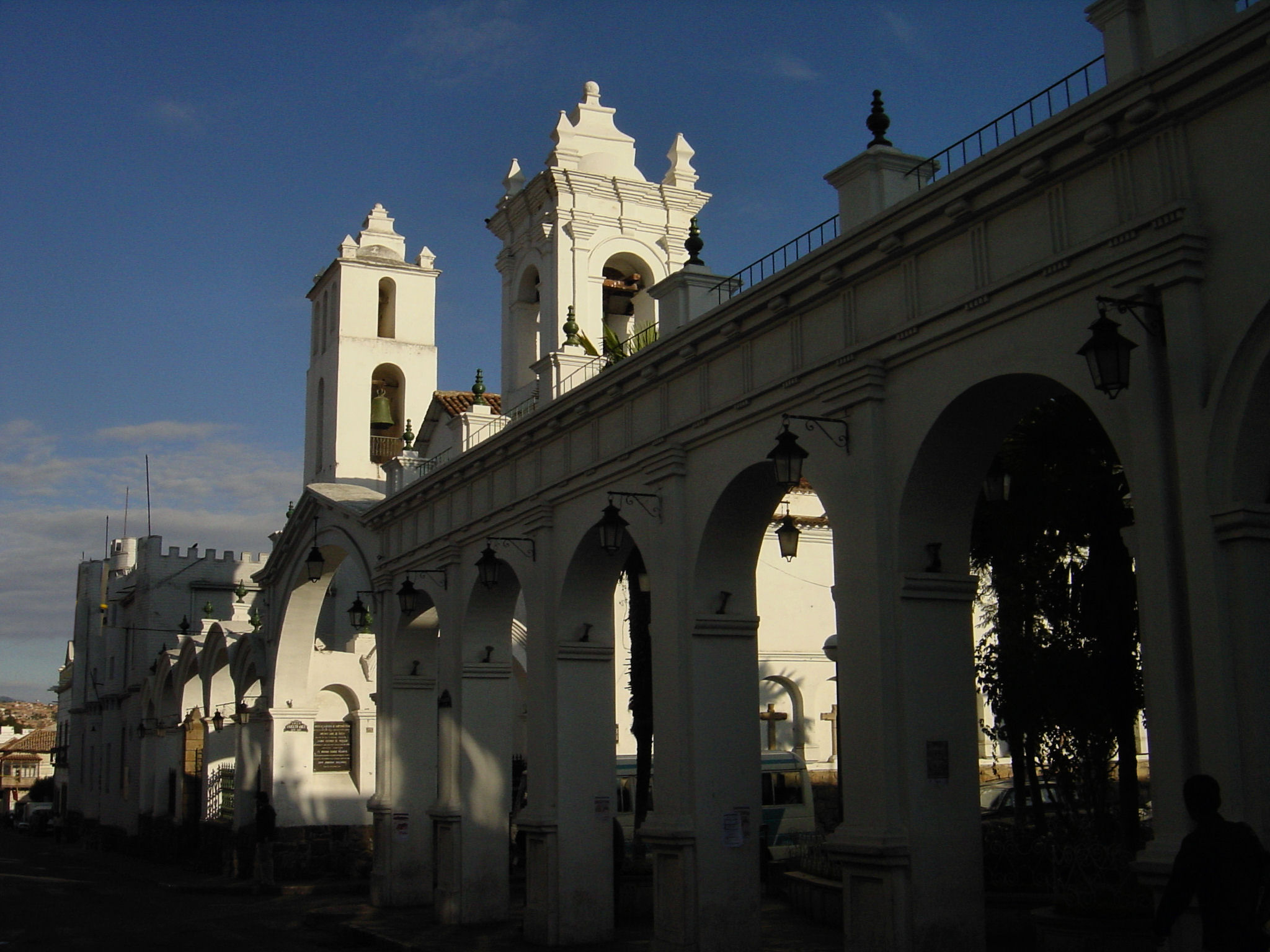 Basílica de San Francisco, Sucre, Bolivia